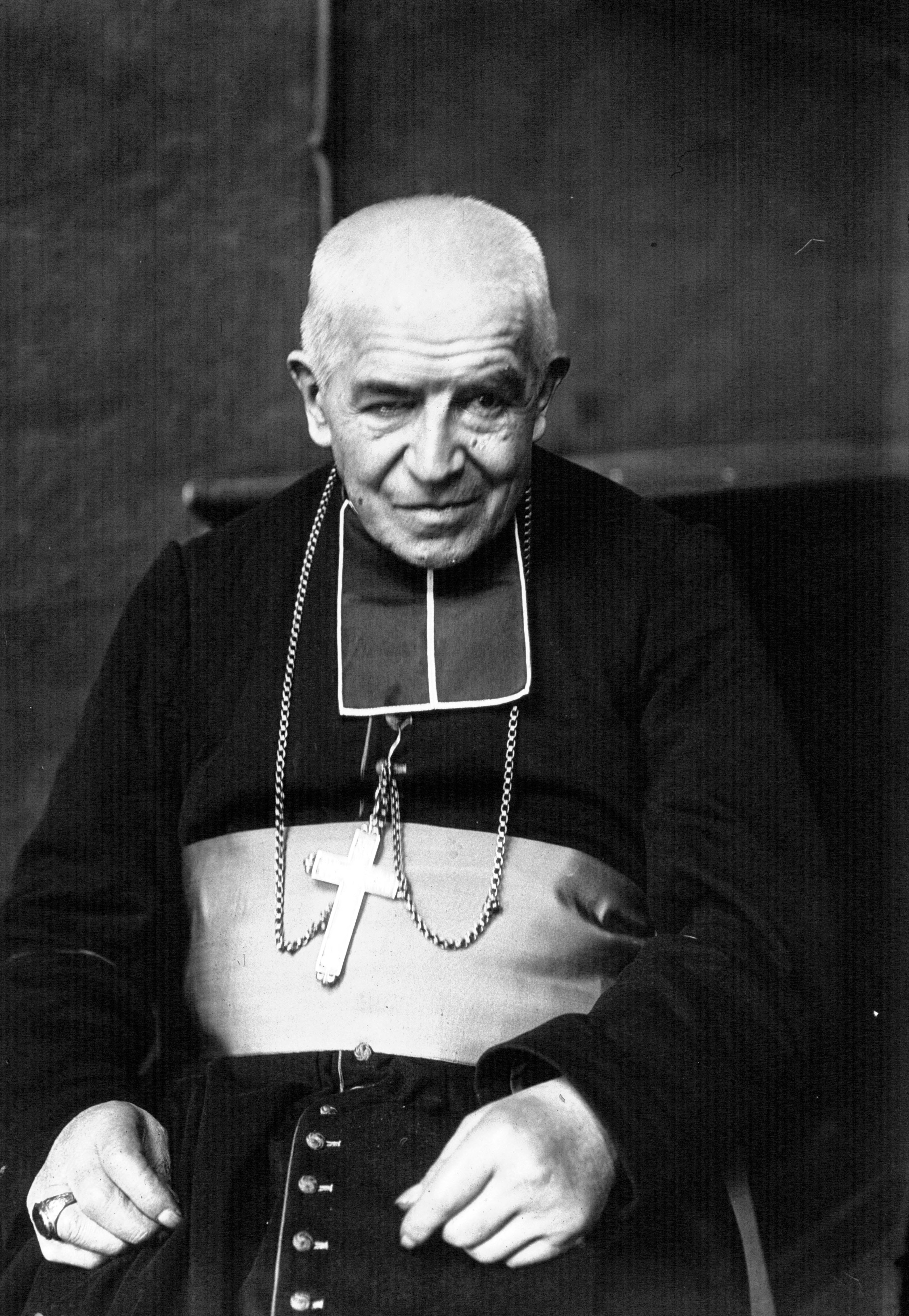 Monseigneur de Ligonnès, évêque de Rodez (photographie de presse)